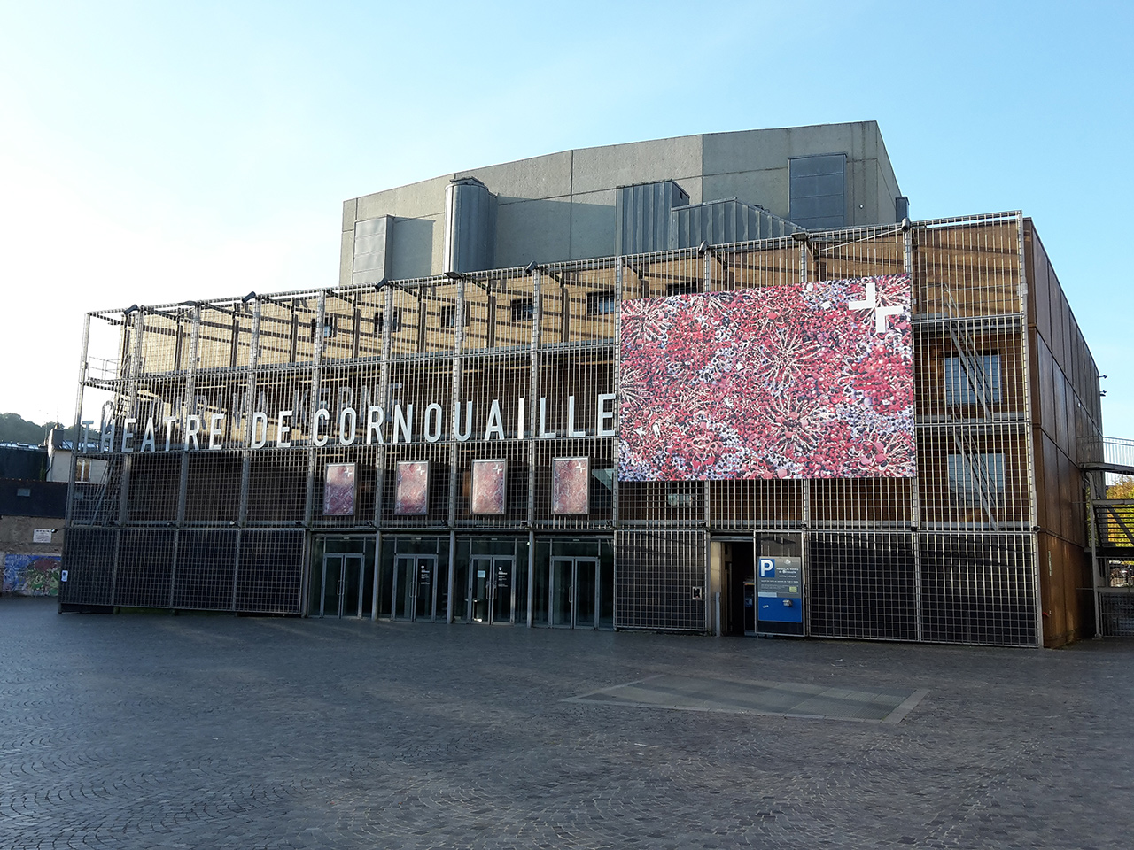 Théâtre de Cornouaille, scène nationale de Quimper